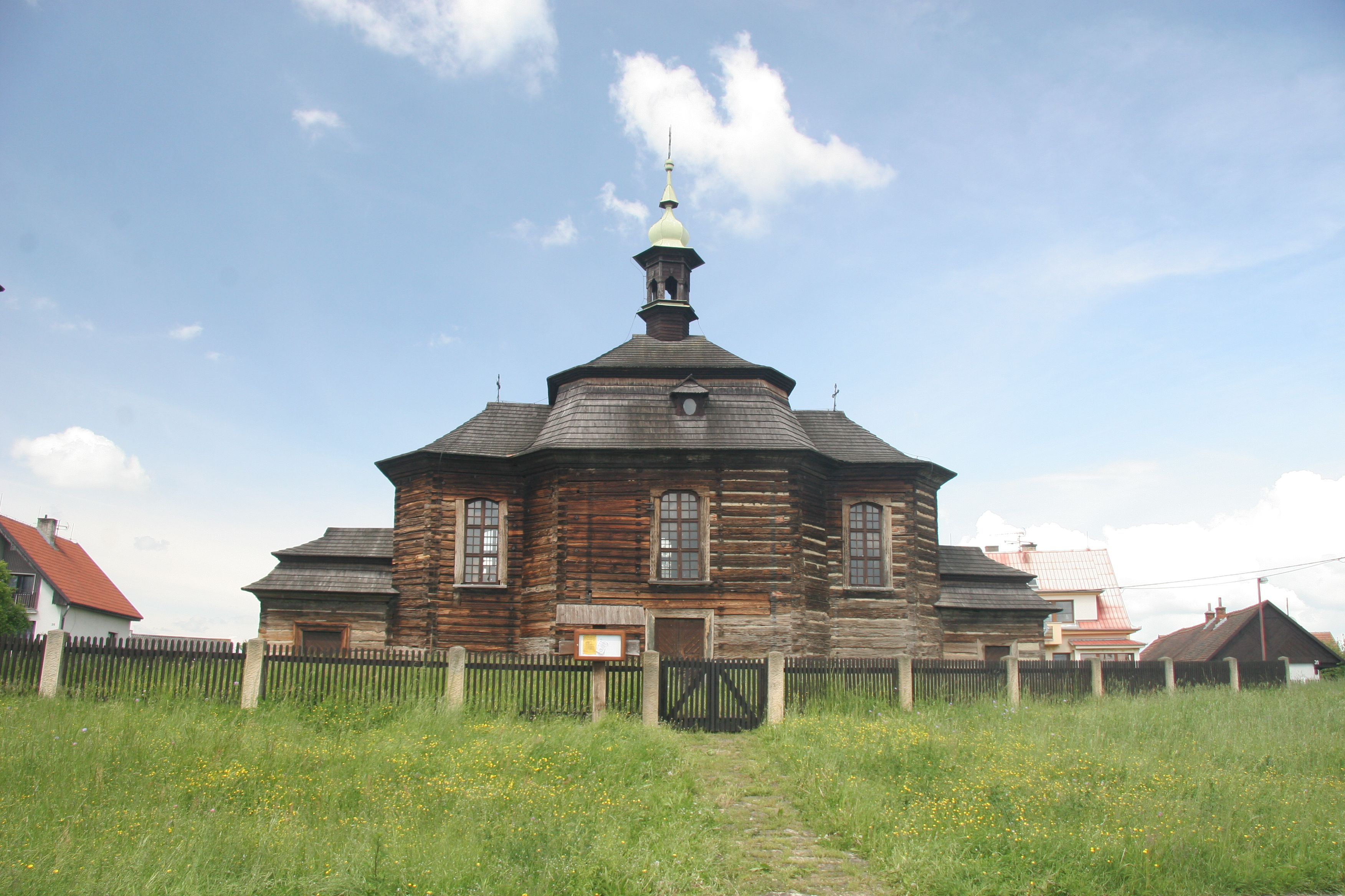 Kostel sv. Jiří (Loučná Hora), Loučná Hora